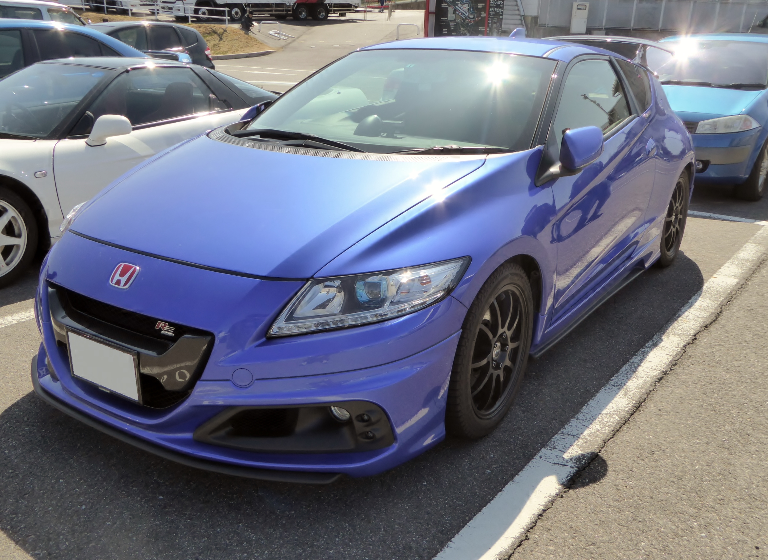 ZF2型ホンダ・CR-Z無限RZをフロントから撮影。